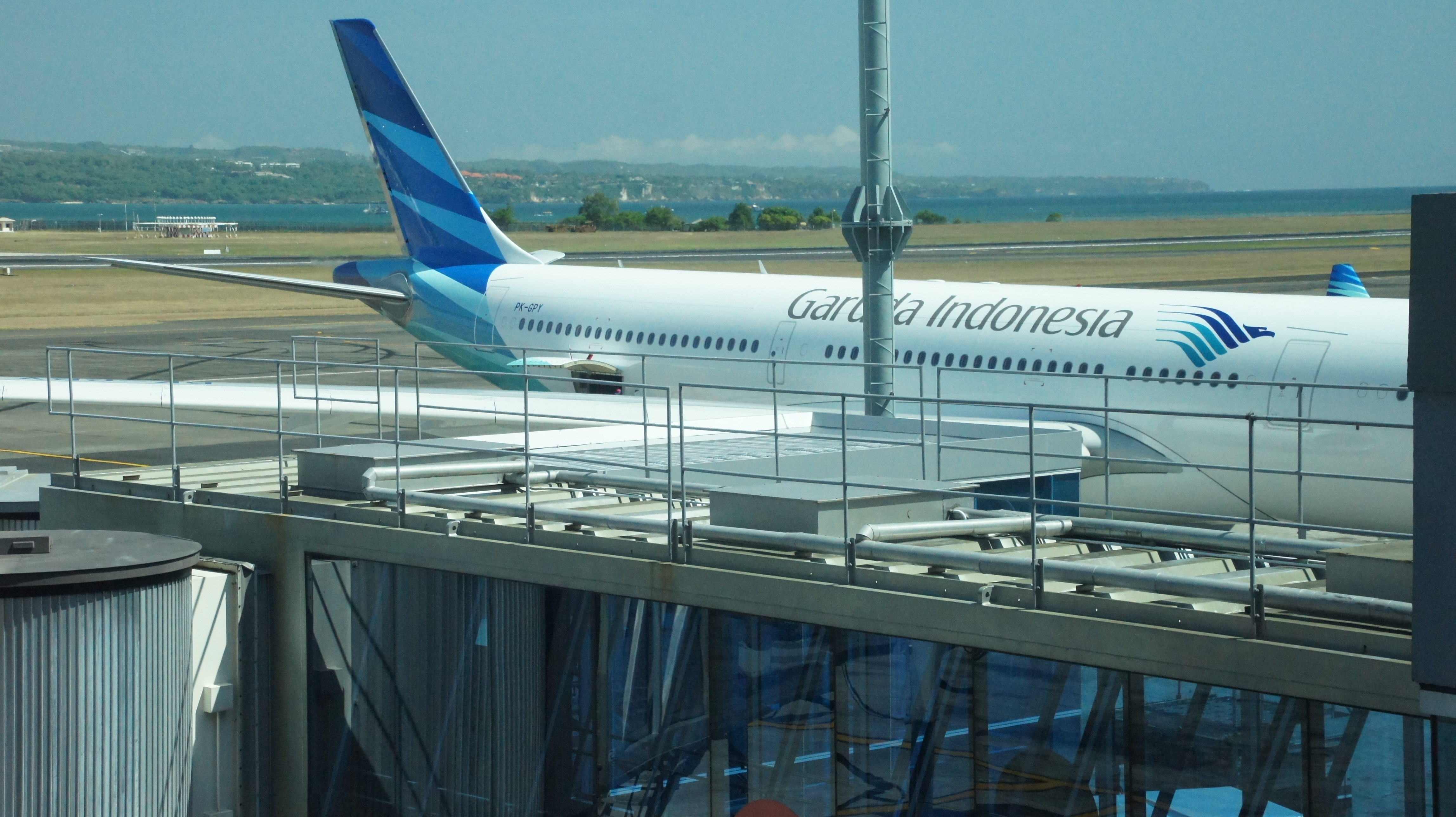 中文（中国大陆）: 注册编号为PK-GPY的班机在伍拉·赖国际机场停机位等候乘客登机。